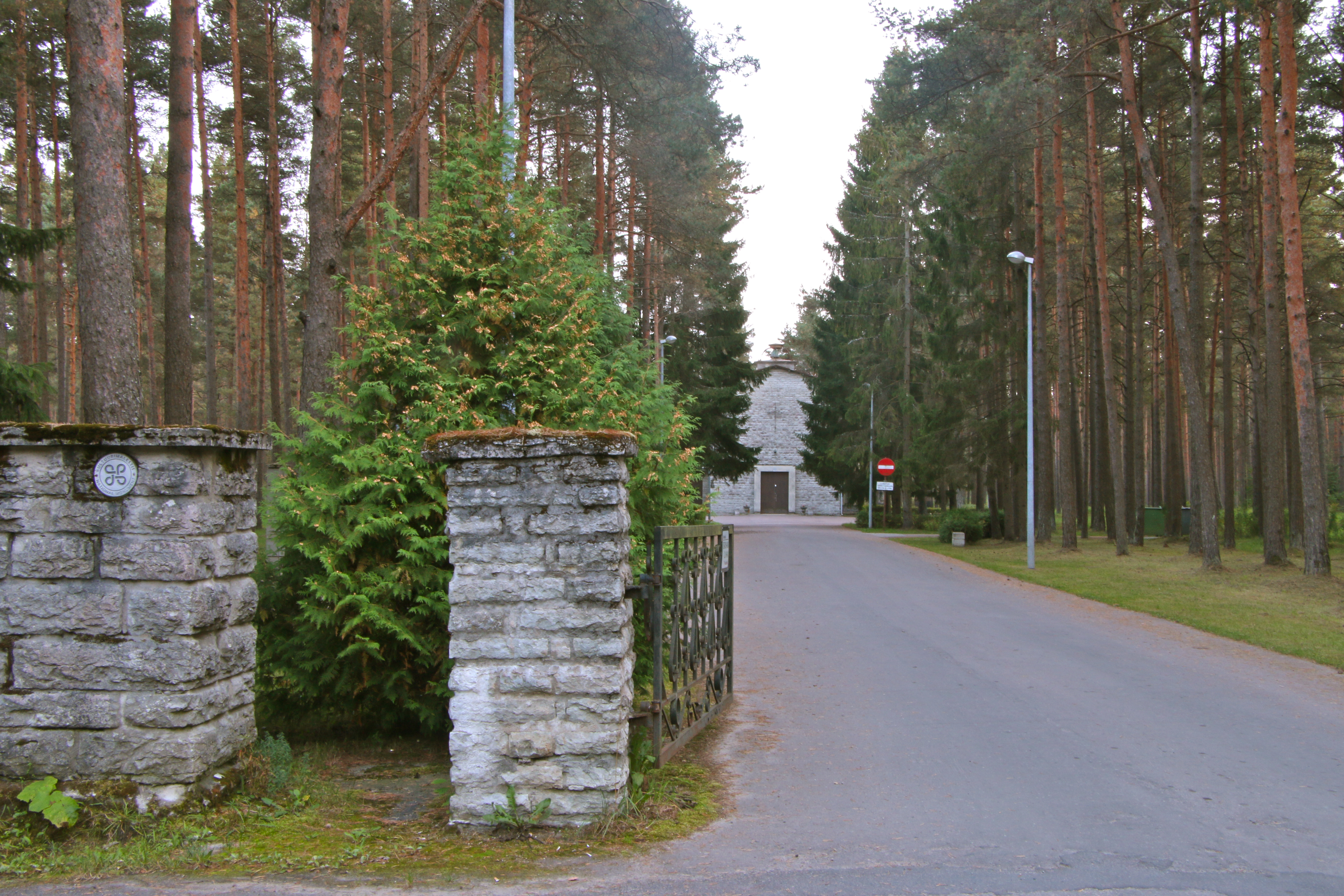 Kultuurimälestis 1081